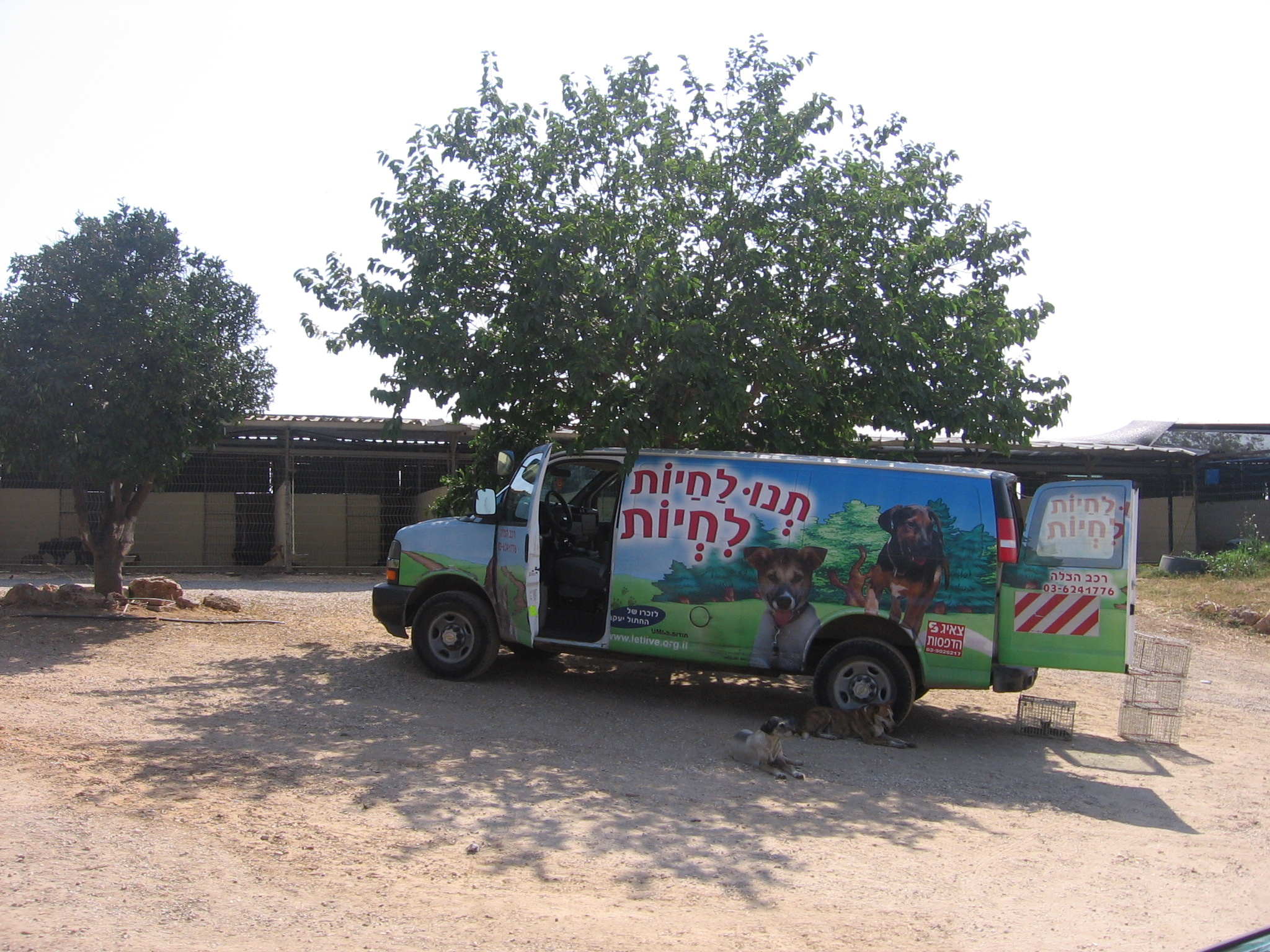 רכב החילוץ וההצלה של עמותת תנו לחיות לחיות